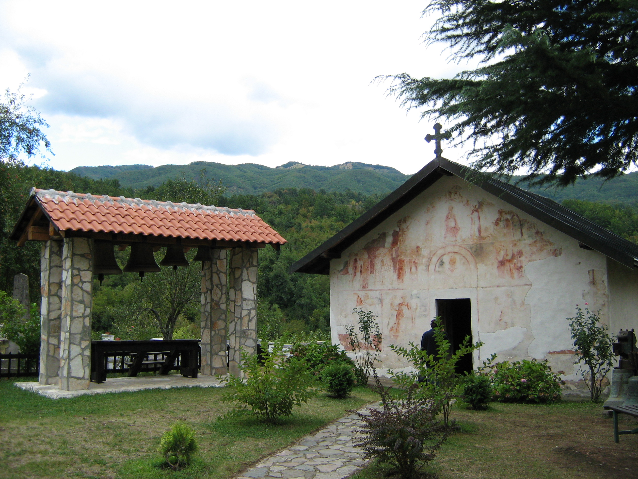 Morača monastery